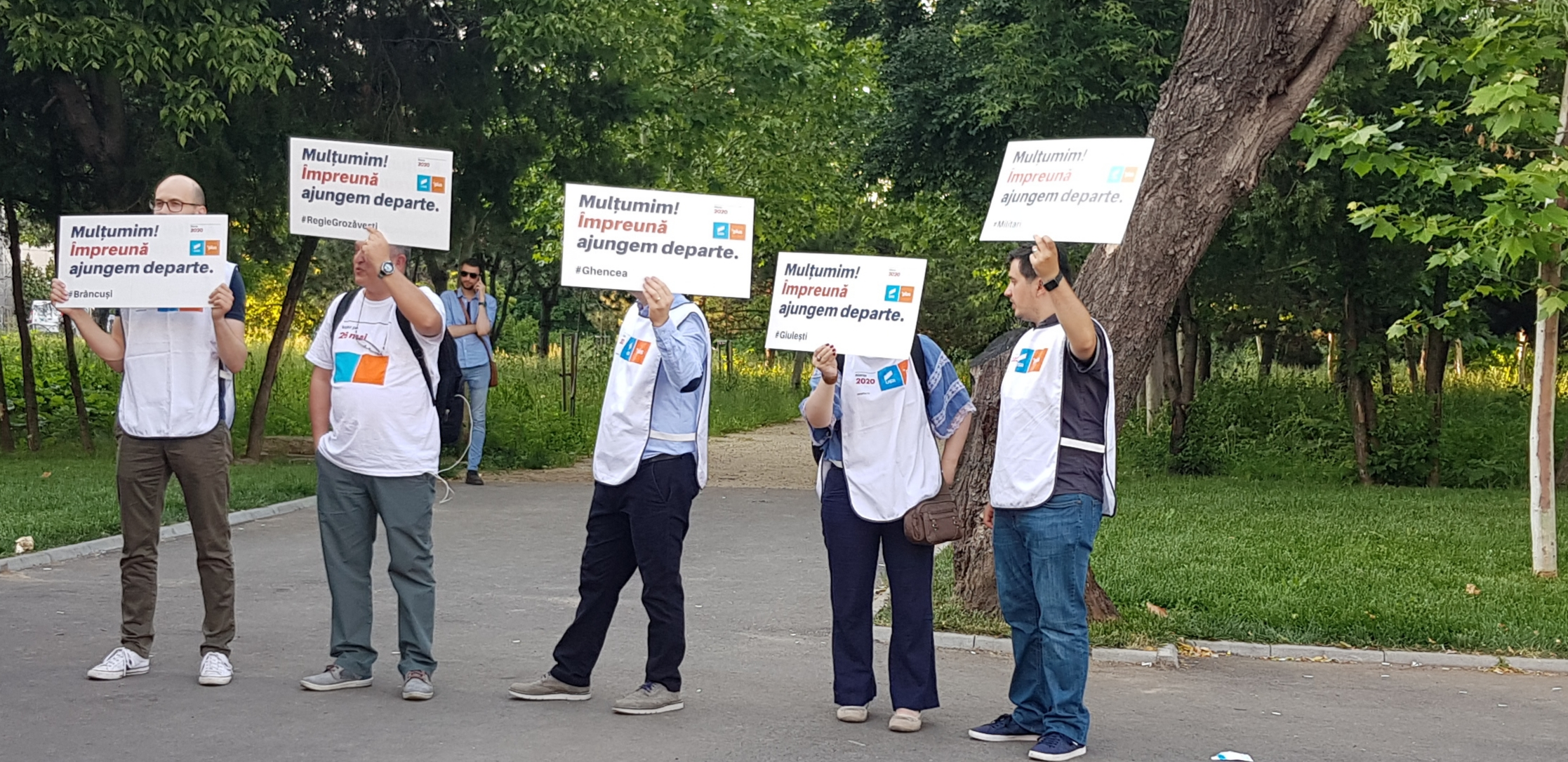 După alegerile europarlamentare 2019, București, metrou Poliehnica.